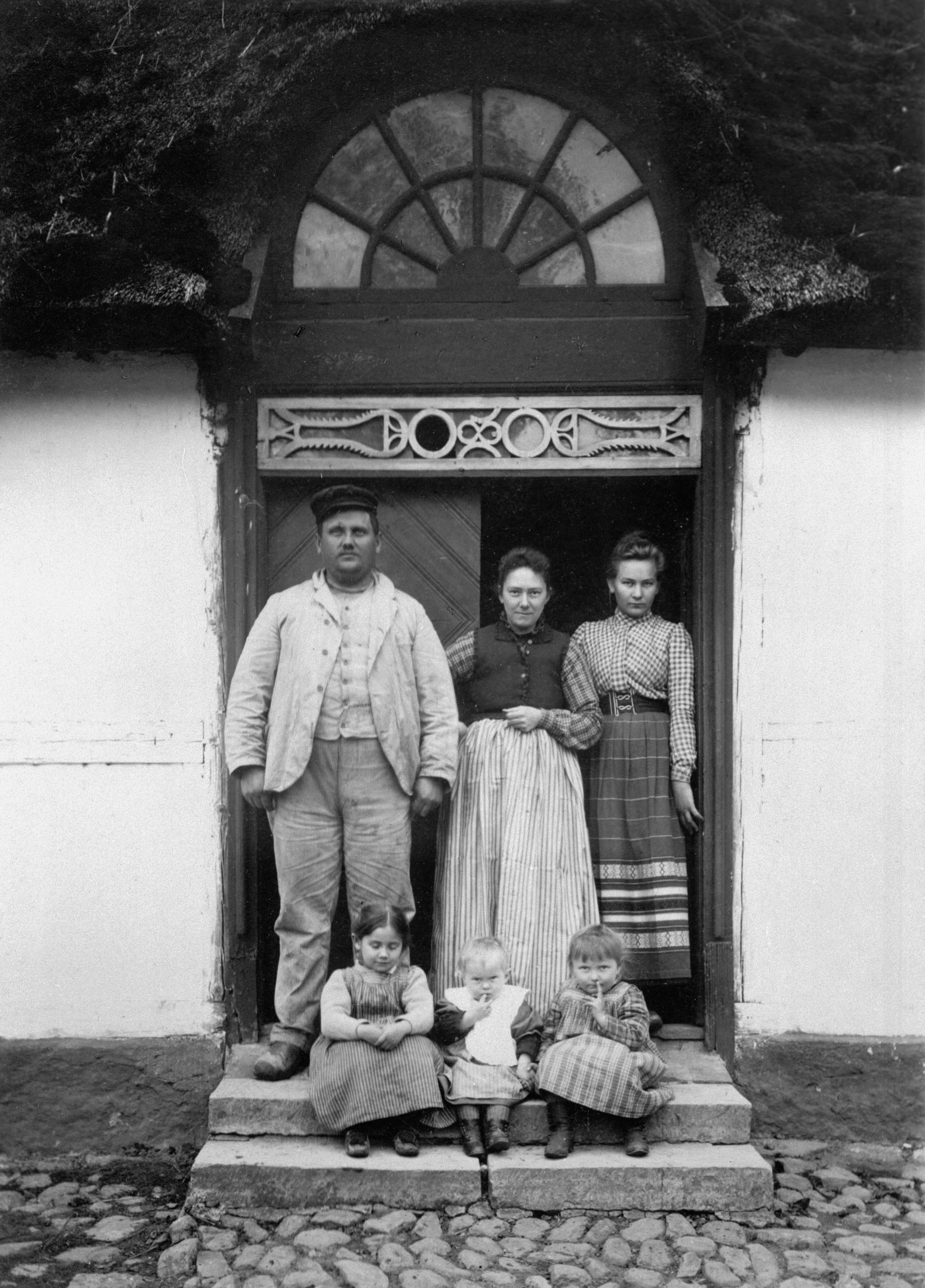 Bondfamilj i Västra Klagstorp, Skåne. Fotograferade för Svenska Turistföreninges pristävlan 1902.